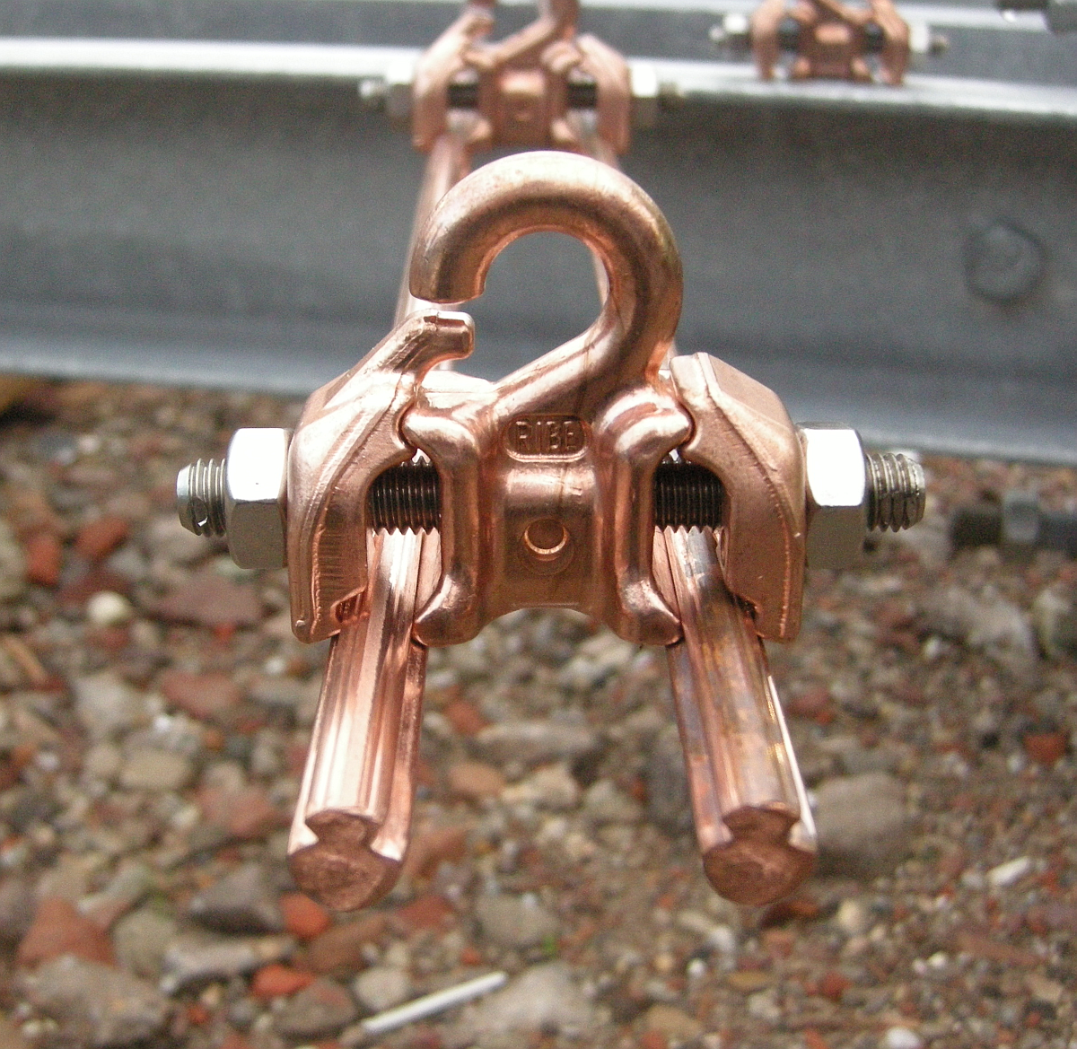 De doorsnede van de koperen rijdraad van de Nederlandse Spoorwegen op station Arnhem